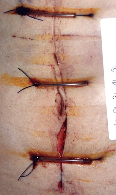 Incisió de laparotomia supraumbilical.